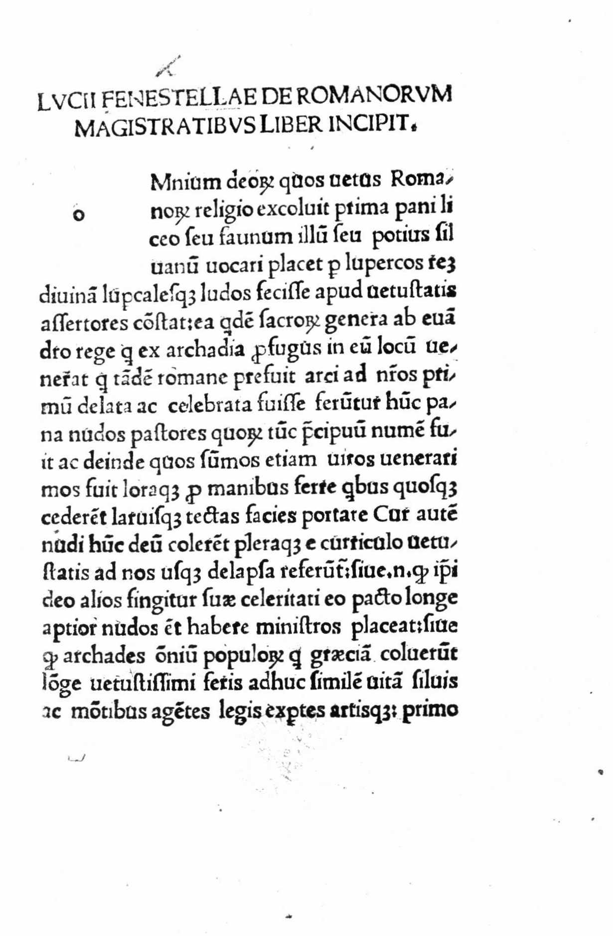 carta a1r